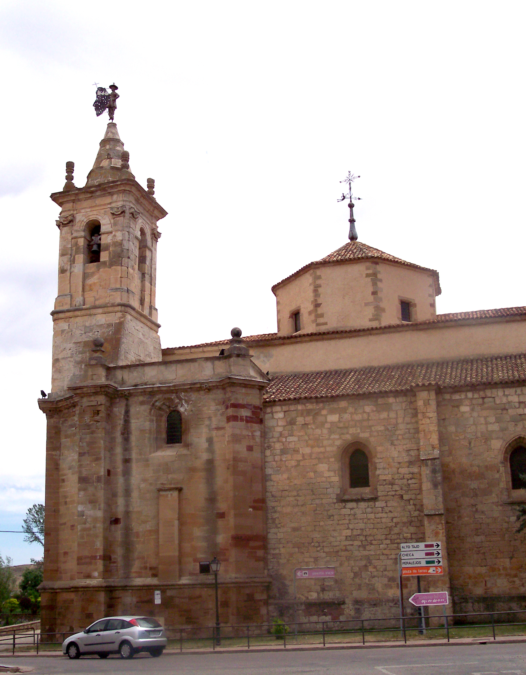 Convento de San Francisco, Molina de Aragón, Guadalajara, España